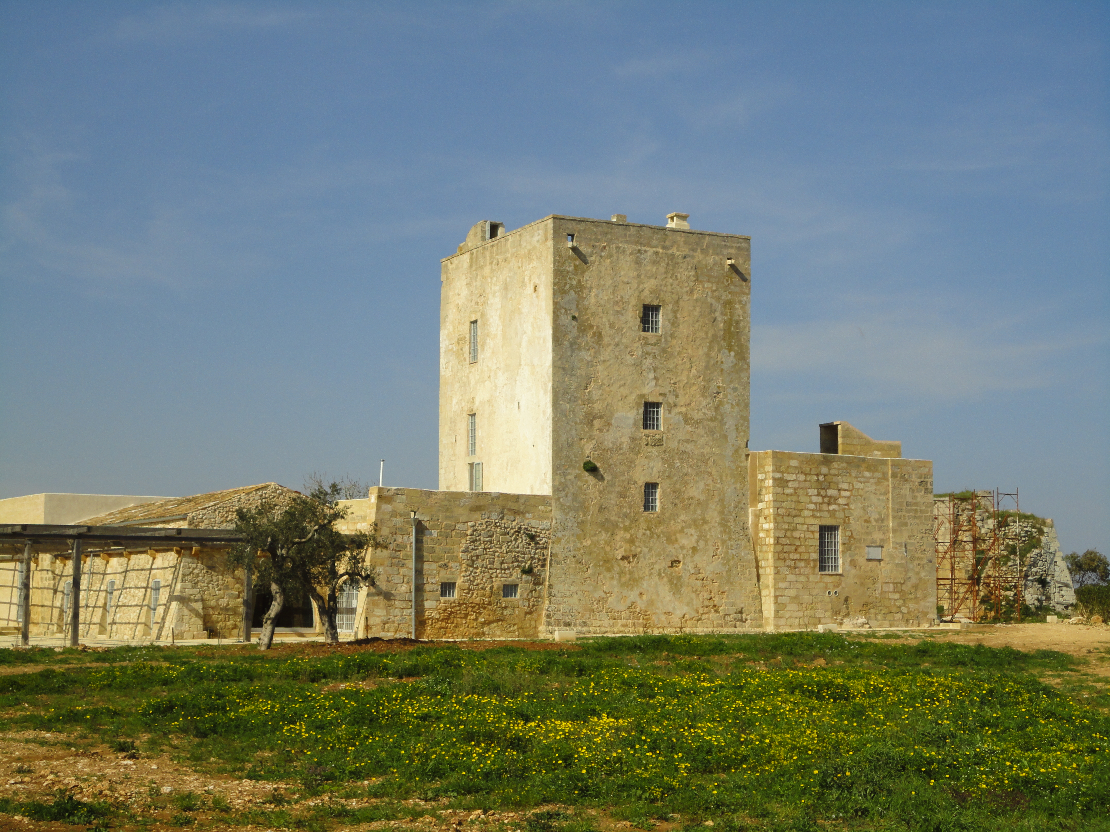 Abbazia del Mito Depressa-Tricase, Lecce